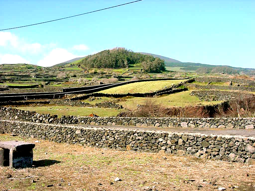 Paisagem agrícola das Cinco Ribeiras próxima ao Porto das Cinco Ribeiras, ilha Terceira, Açores